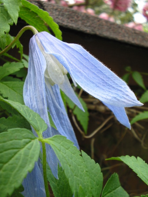 Description: Clematis alpina, 1 avril 2003, Jardin des Plantes, Paris